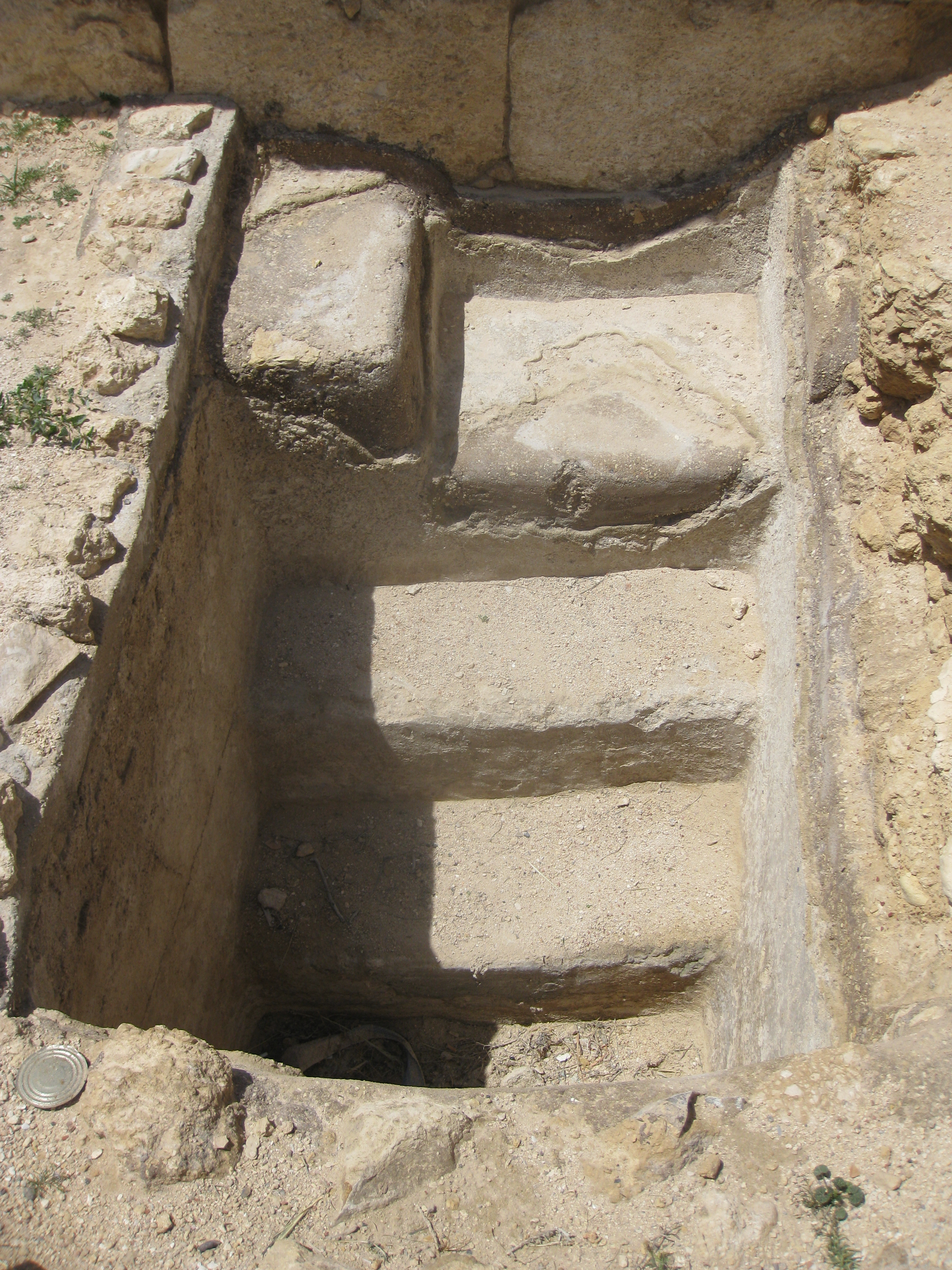 Herodion (Herodyon, Herodium) Mikve מקוואות בהרודיון